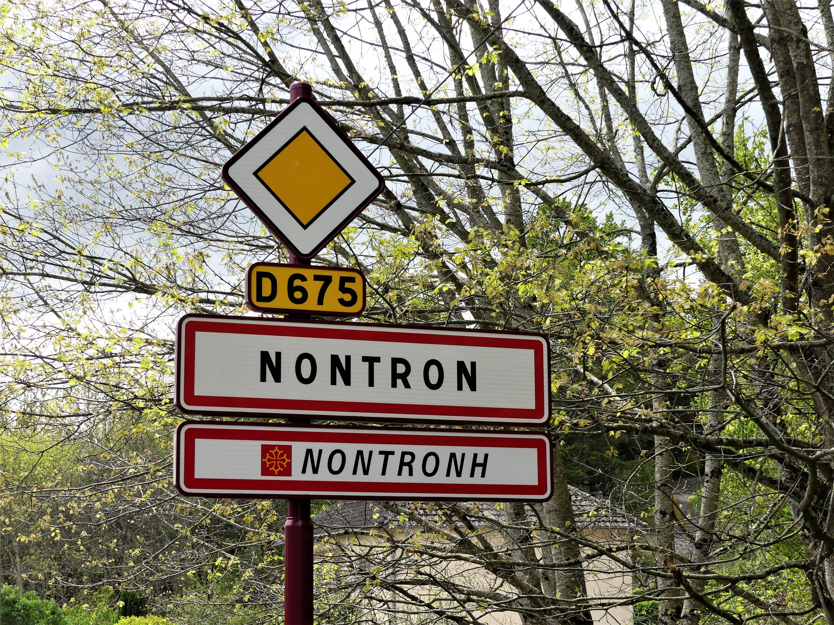 Panneau d'entrée à Nontron (en français et occitan), Dordogne, France.